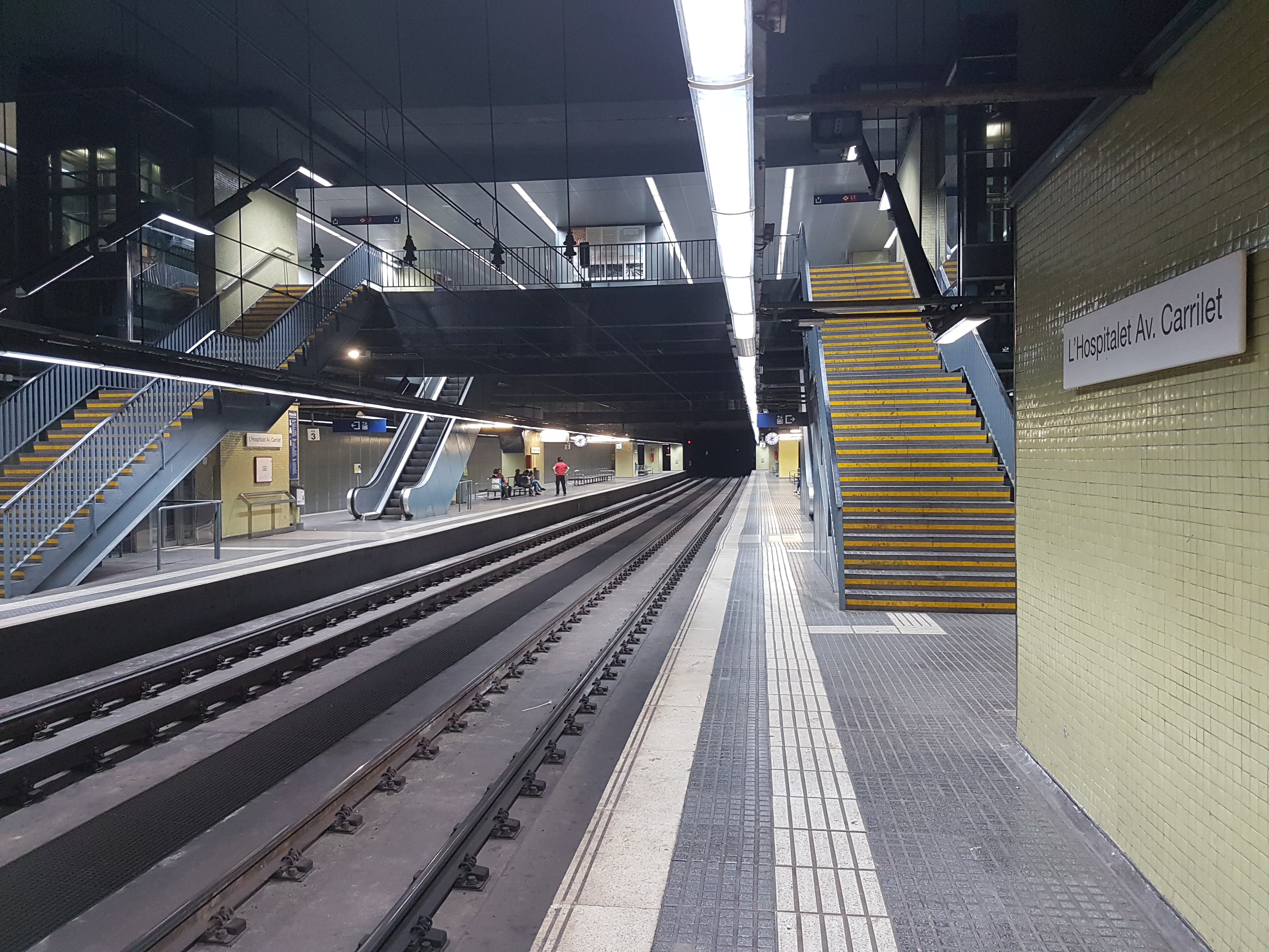 Vies centrals (1 i 2) de l'estació